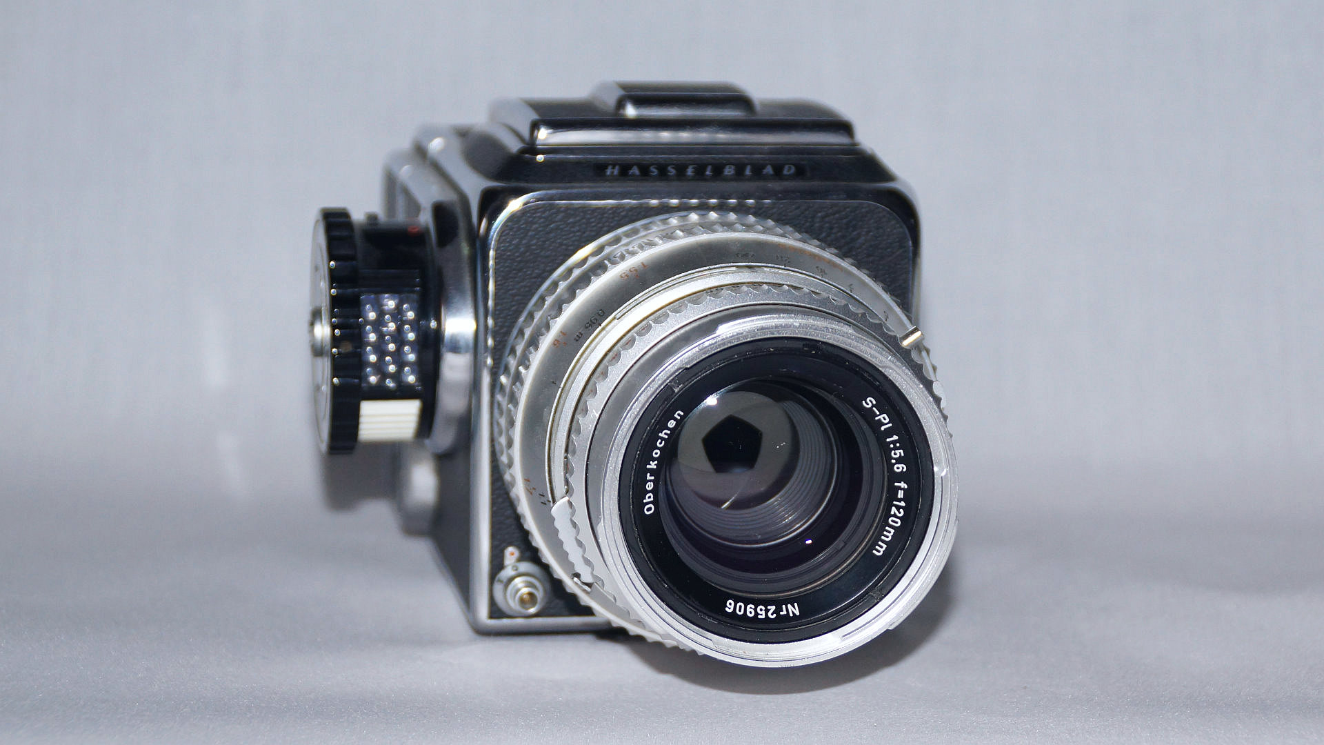 Hasselblad 500 C mit angesetztem Belichtungsmesser und Zeiss S-Planar 1:5.6/120mm Foto Wolfgang Pehlemann DSC04830